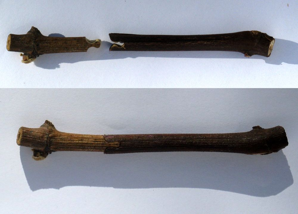 Weinrebenveredlung durch Omega-Pfropfen; links Edelreis, rechts: Unterlagereis